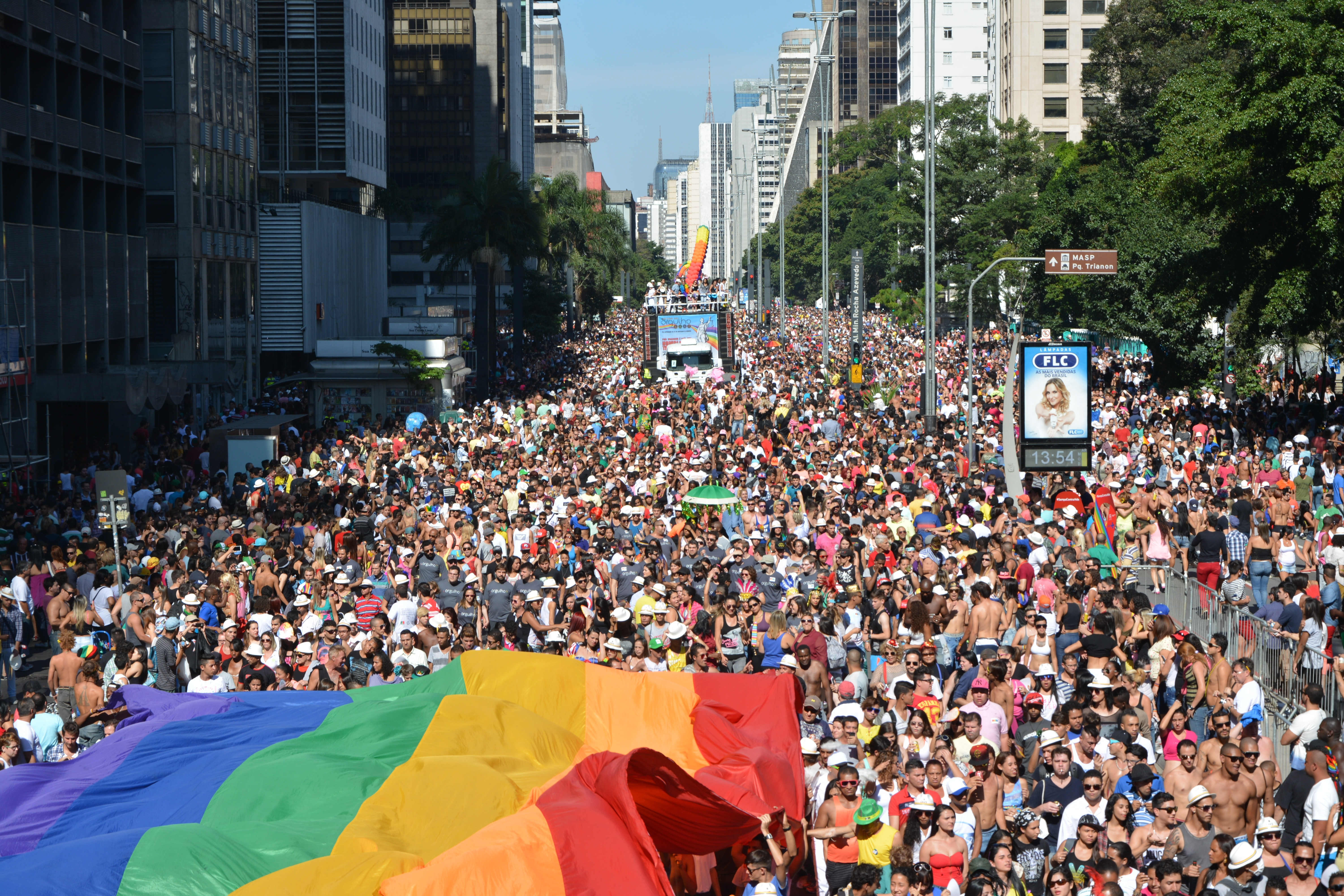 São Paulo's 18th annual LGBT Pride Parade 2014 - Parada Gay - Gay Pride. Read more here